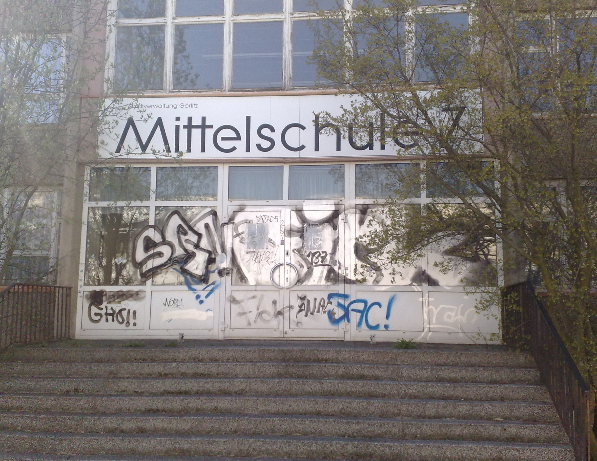 Ehemalige Mittelschule 7 an der Scultetus Straße